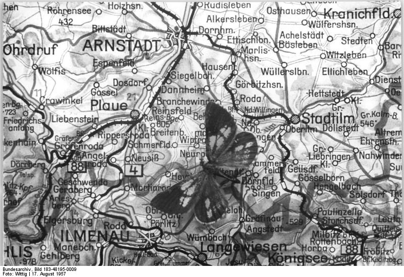 Gemeiner Kiefernspanner Zentralbild Wittig Weiß-Ho. 17.8.1957 Lufthansa bekämpft Kiefernspanner. In den Gebieten von Arnstadt, Stadtilm und Ilmenau sind etwa 2300 ha Wald vom Kiefernspanner befallen. Ein Spezialflugzeug der Deutschen Lufthansa vom Typ AN 2 bekämpft nach Abschluss entsprechender Verträge mit den staatlichen Forstwirtschaftsbetrieben und den Abteilungen Landwirtschaft und Pflanzenschutz bei den Räten der Bezirke die Schädlinge mit DDT und HCC-Mitteln. Bei einer Arbeitsflughöhe von 5-10 m über dem Wald und einer Arbeitsbreite von 30 m sowie einer Fluggeschwindigkeit von 150 km-h werden 40 kg Stäubemittel pro ha von der Maschine ausgestreut. UBz: Kiefernspannermännchen auf einer Karte der befallenen Waldbestände im Raum Arnstadt, Ilmenau und Stadtilm.